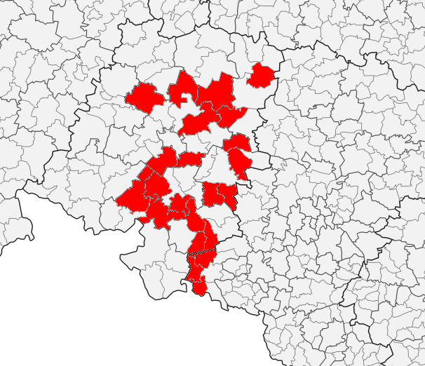 Gemeinden in denen mehr als 20 Prozent Deutsche leben und somit das Recht auf Einführung der Deutschen Sprache als Minderheitensprache haben. Ergebnisse nach der Volkszählung von 2011 (Stand Februar 2013). Eingezeichnet sind die Gemeinden: Alt-Poppelau, Colonnowska, Czissek, Groß Lassowitz, Groß Peterwitz, Himmelwitz, Klein Strehlitz, Kranowitz, Leschnitz, Murow, Oberglogau, Polnisch Neukirch, Proskau, Radlau, Reinschdorf, Rudnik, Tarnau, Turawa, Ujest, Walzen, Zembowitz und Zülz.